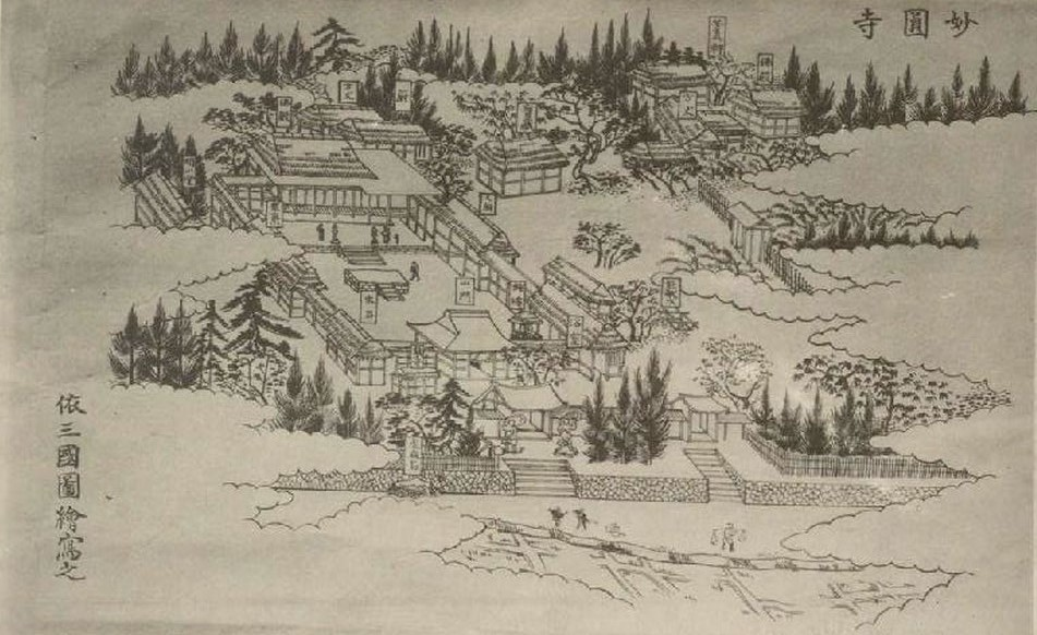 伊集院町志に掲載されている妙円寺の絵。三国名勝図会に掲載されている妙円寺の絵